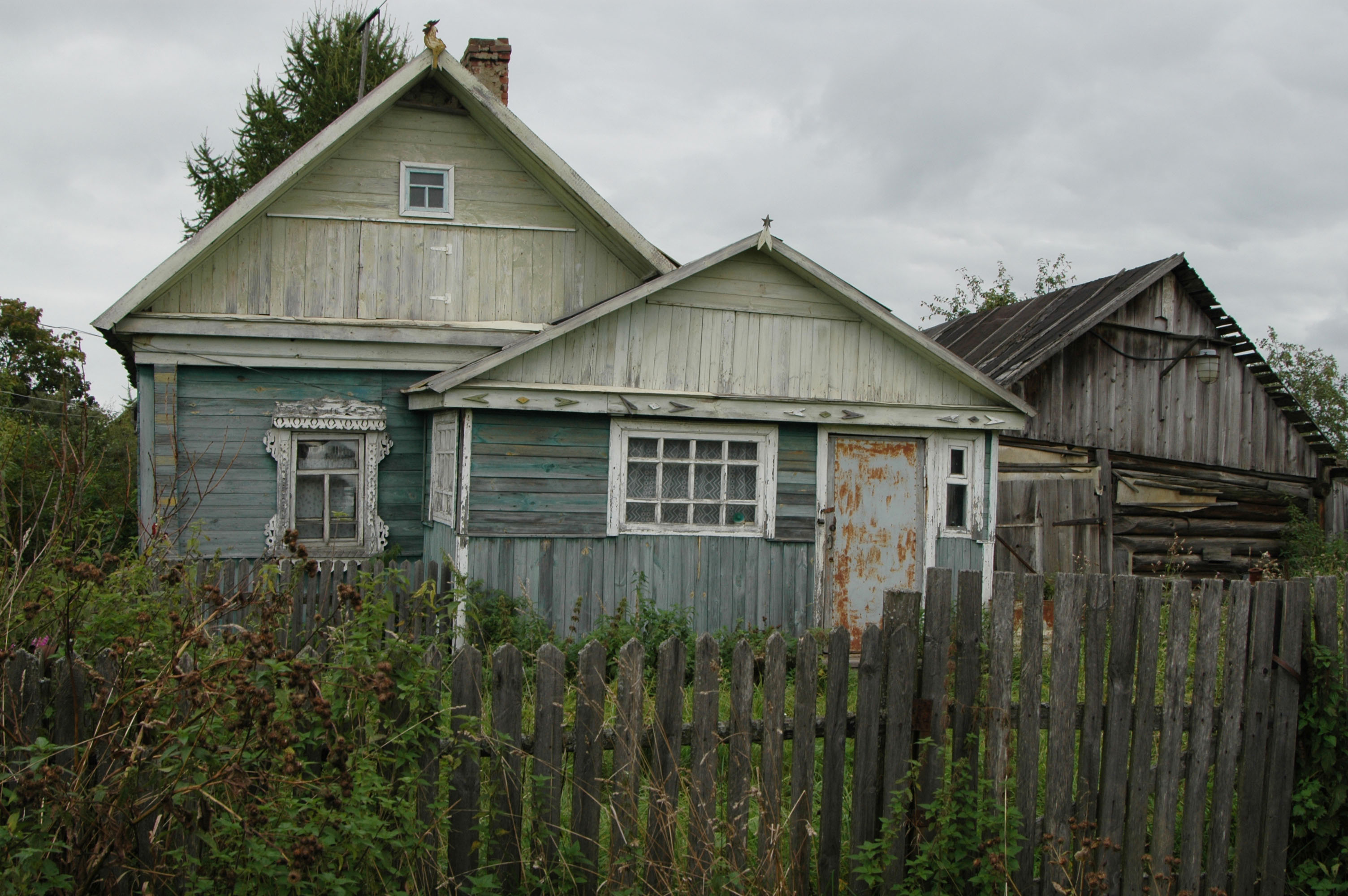 Дома в деревне Прокудино (2006)